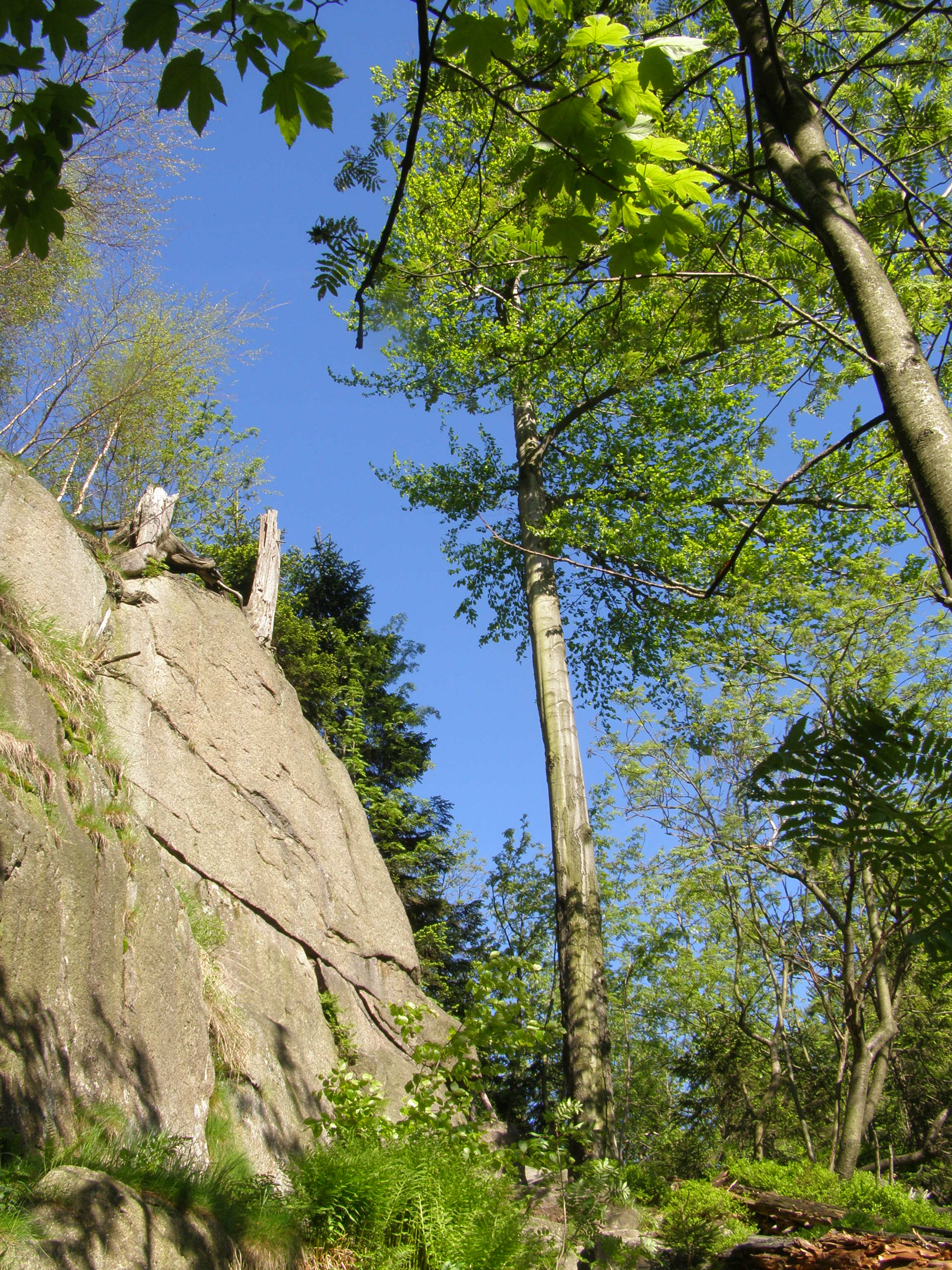 Česky: Jizerské hory, Smědavská hornatina, lokalita Štolpichy